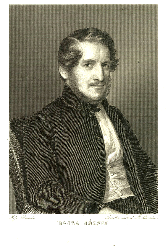 Bajza József (Szűcsi, 1804. január 31. – Pest, 1858. március 3.) költő, színigazgató, kritikus, a Magyar Tudományos Akadémia és a Kisfaludy Társaság tagja.